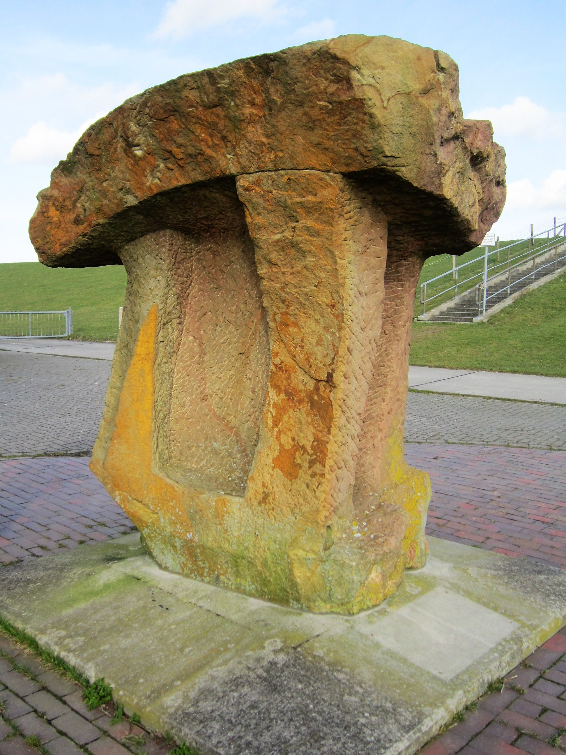 Skulptur "2. Schöpfungstag: „Die Feste – Der Himmel“" von Adrian Jähne in Cäciliengroden Nord (Gemeinde Sande, Landkreis Friesland in Niedersachsen). Die Skulptur ist Station 2 des "Skulpturenpfads Kunst am Deich" am Radweg zwischen Mariensiel und Dangast, der parallel zum Jadebusen-Deich verläuft.